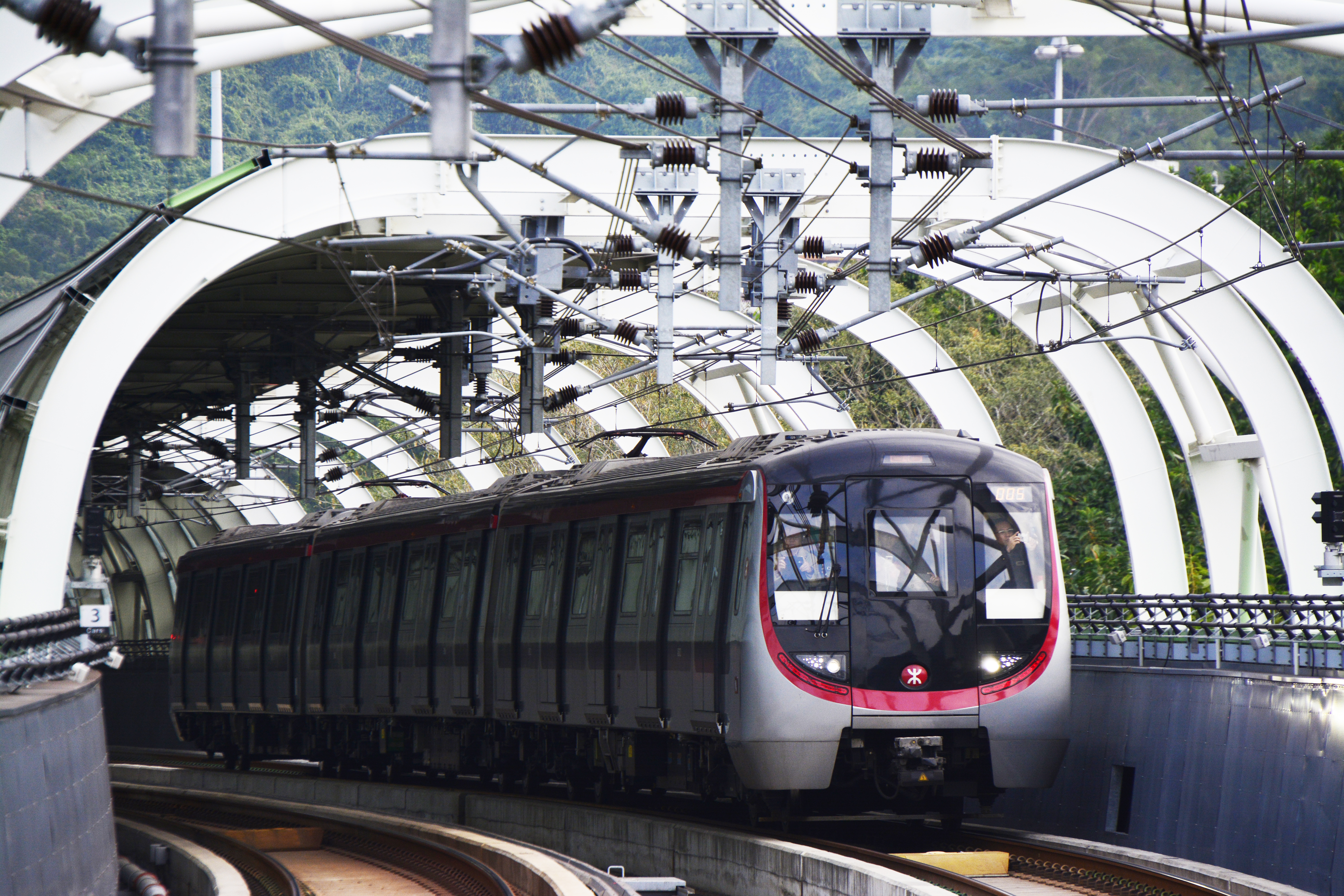 南港島綫中國製列車正進入海洋公園站